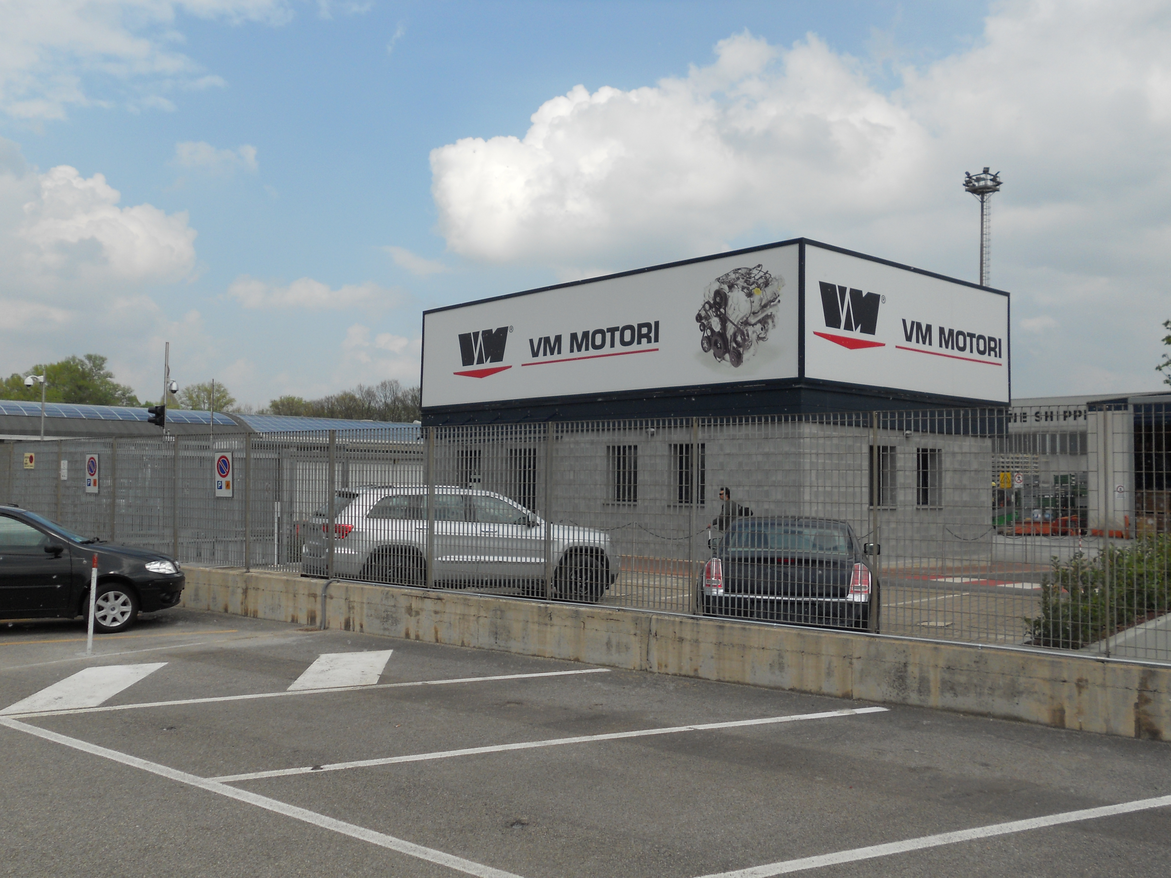 Ingresso della VM Motori a Cento (FE)